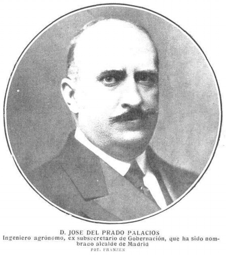 José del Prado Palacios